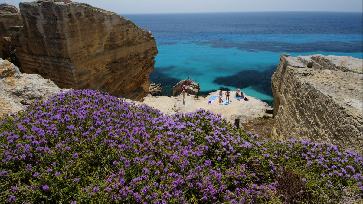 isole egadi sicily boboviel favignana marettimo levanzo bue marino